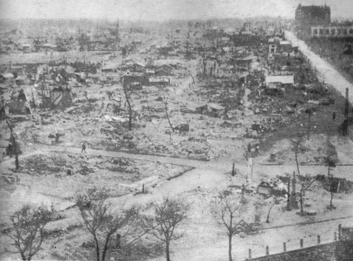 1945年（昭和20年）8月2日、電気ビル屋上より